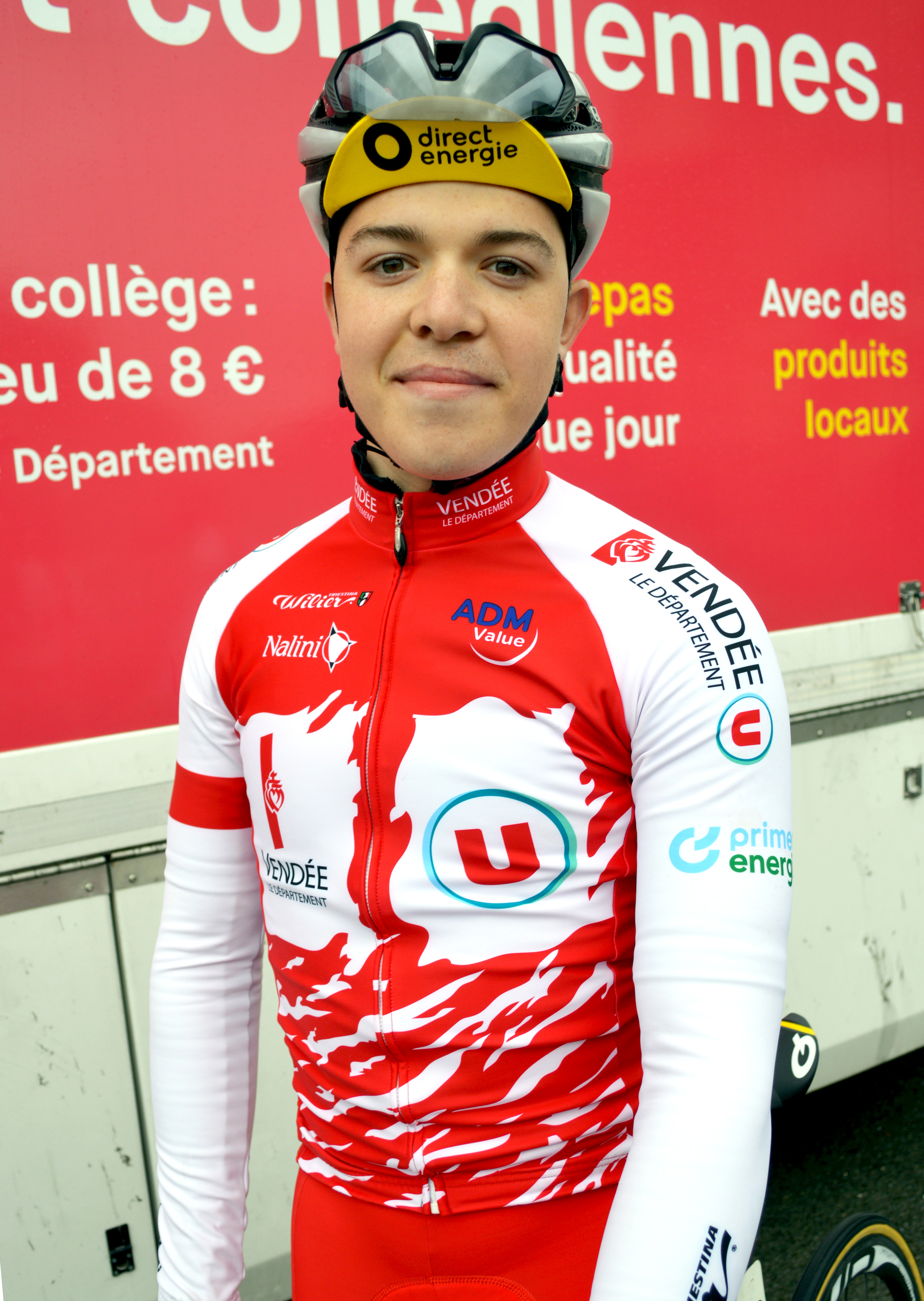 Portrait Valentin TABELLION 2019